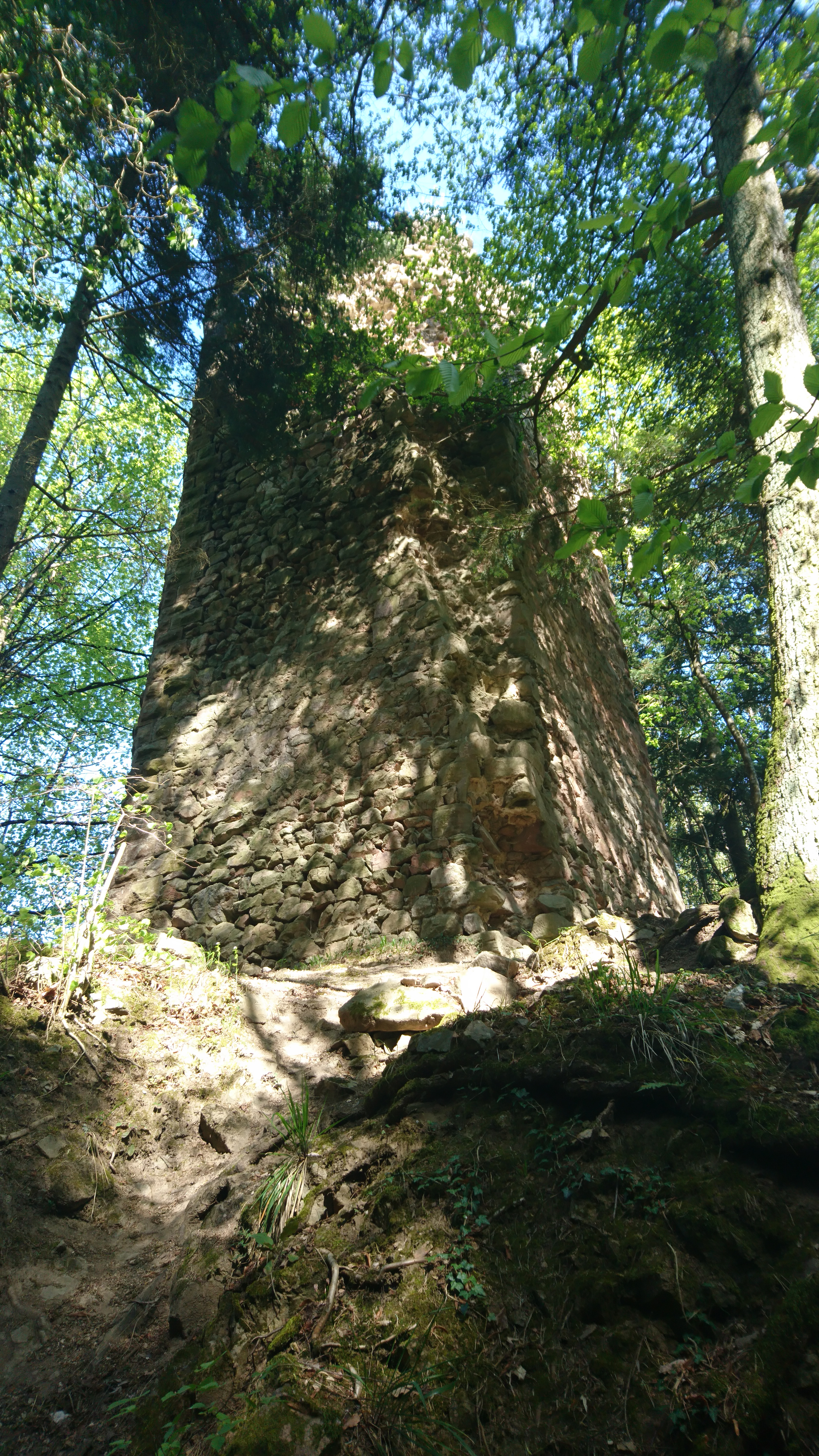 Château de Reichenstein en ruines.